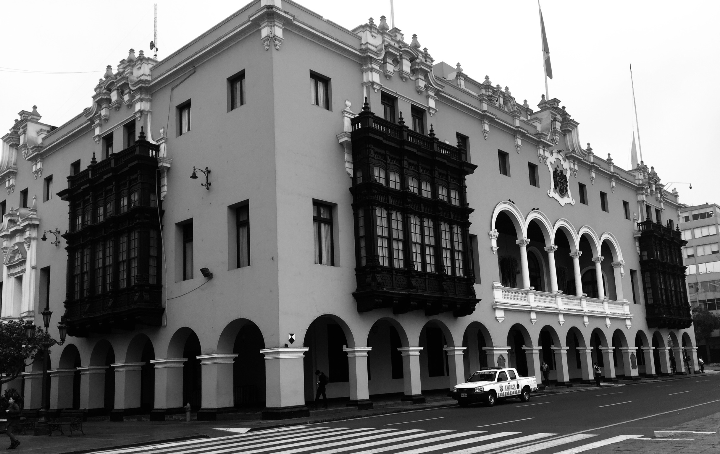 Municipalidad de Lima